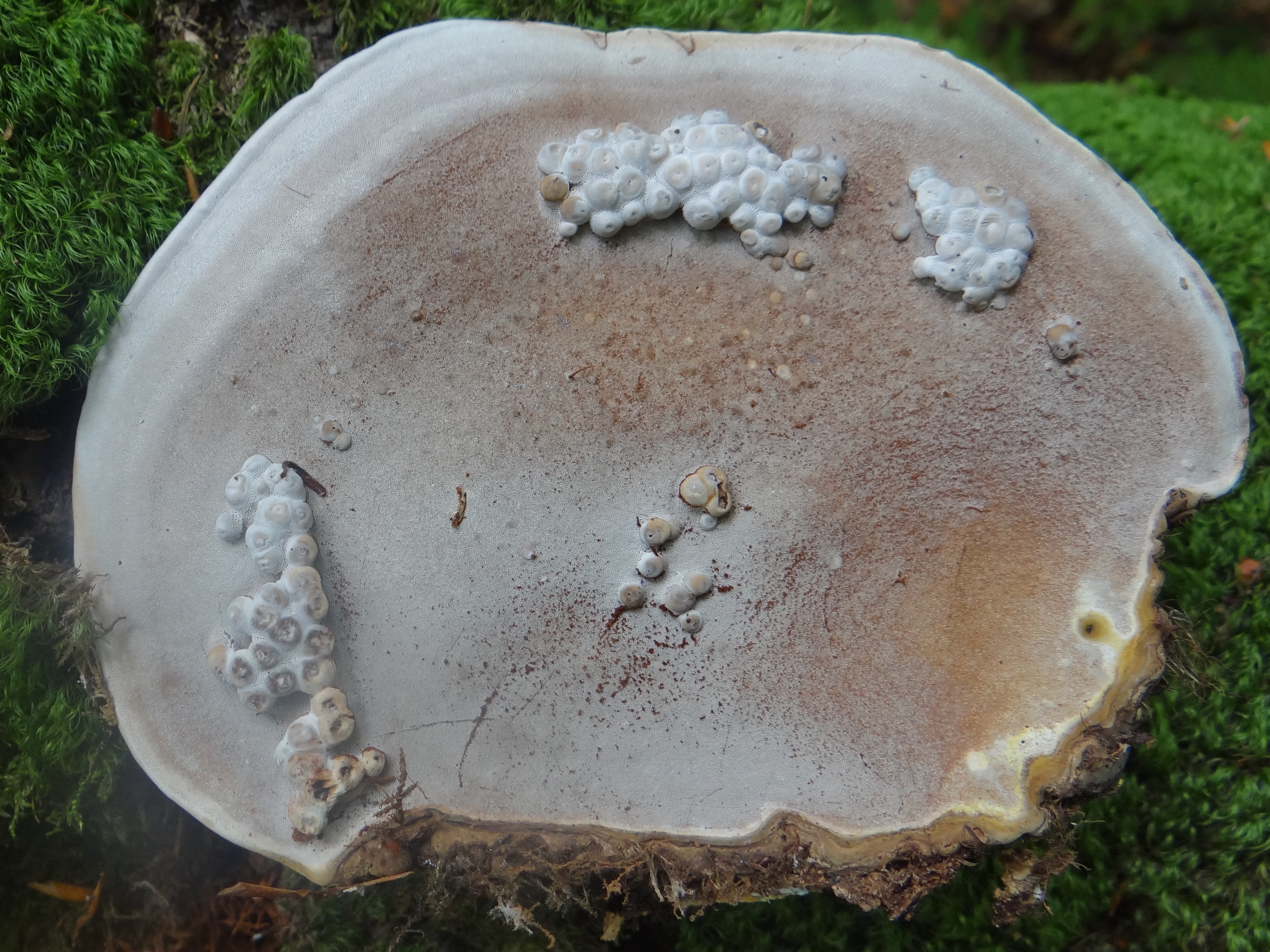 Ganoderma applanatum + galas Agathomyia wankowiczii